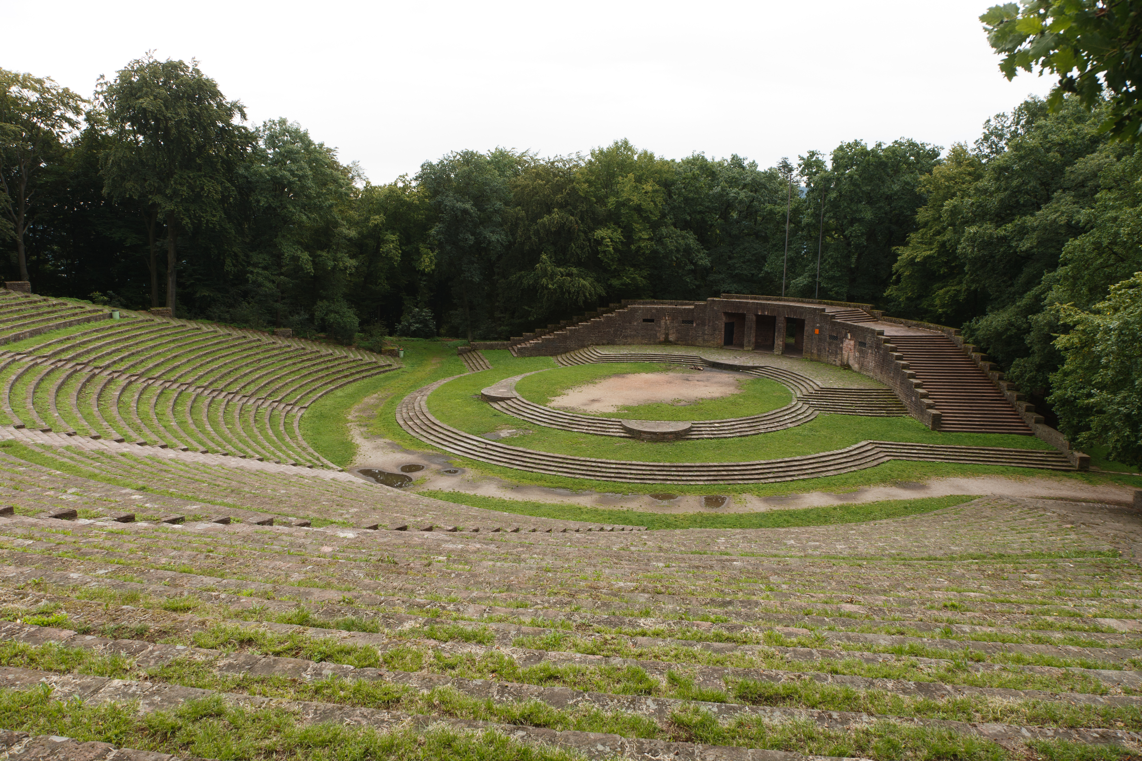 Thingstätte Heiligenberg, Blick auf die Bühne